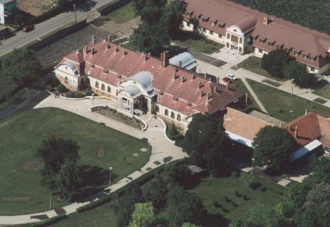 Tiszavasvári, Hungary, aerialphotography